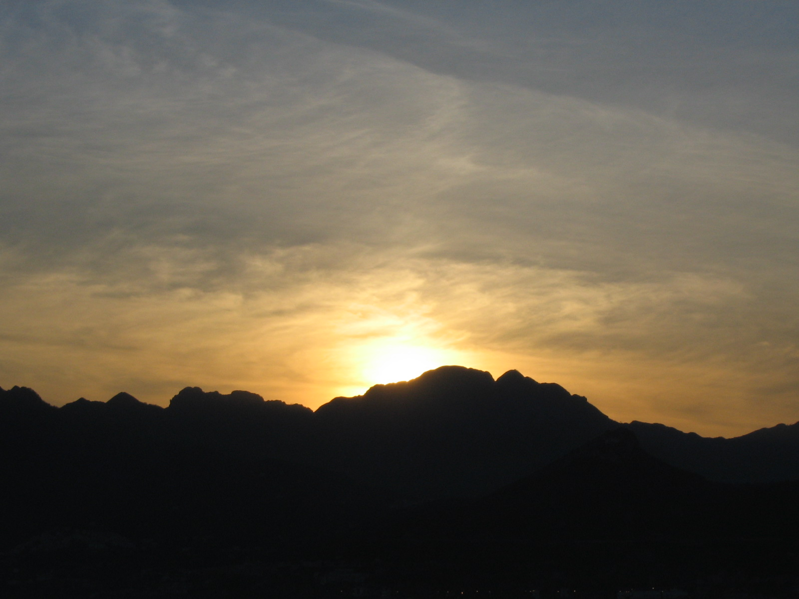 Tramonto dietro Monte Finestra (Cava de'Tirreni)